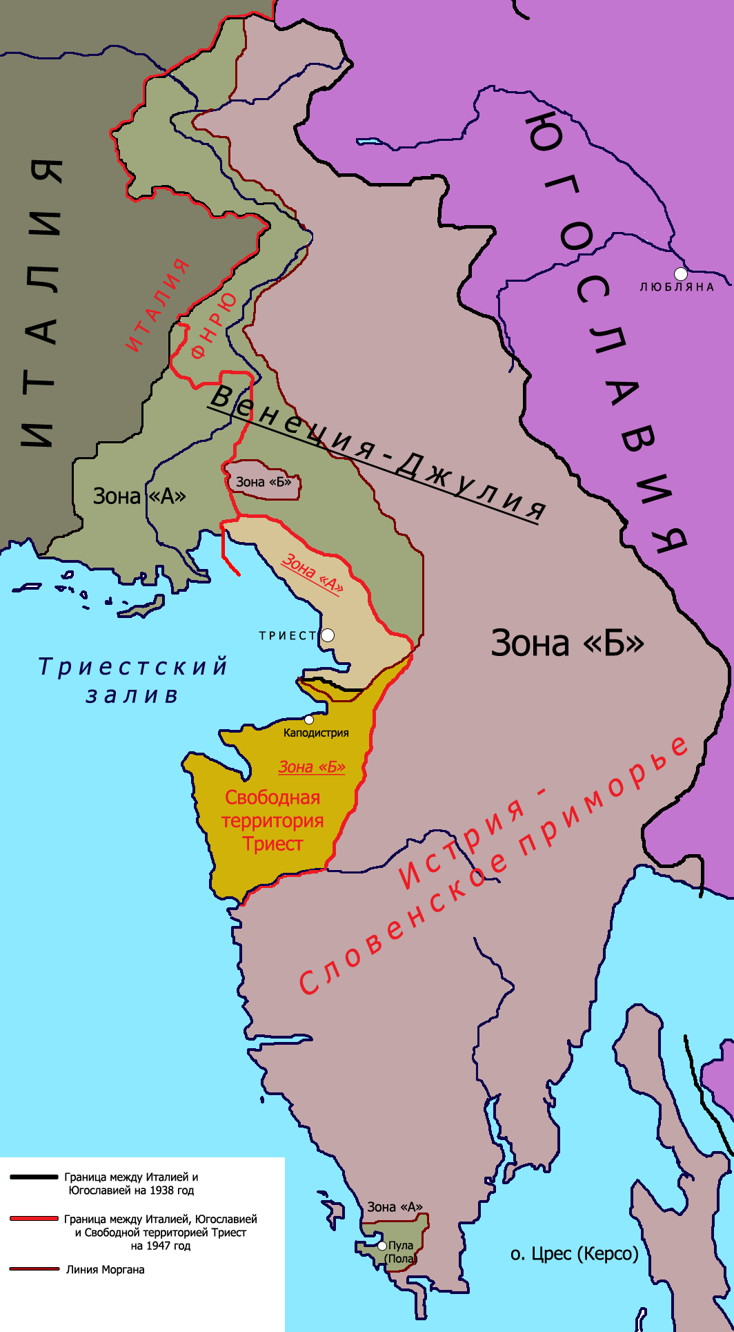 Карта итальянской провинции Венеция-Джулия под англо-американской и югославской оккупацией. Карта Свободной территории Триест